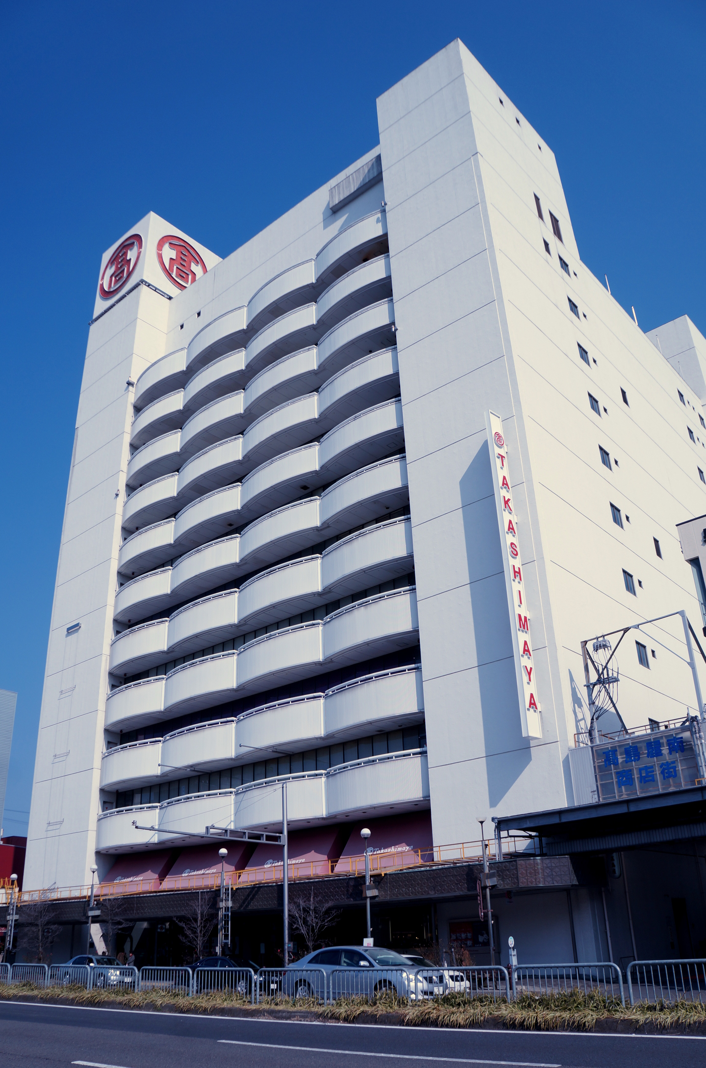 岐阜高島屋